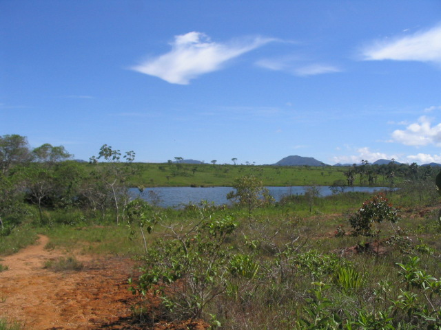 Cette image illustre le lac de Bona Espero au brésil dans l'Etat de Goias